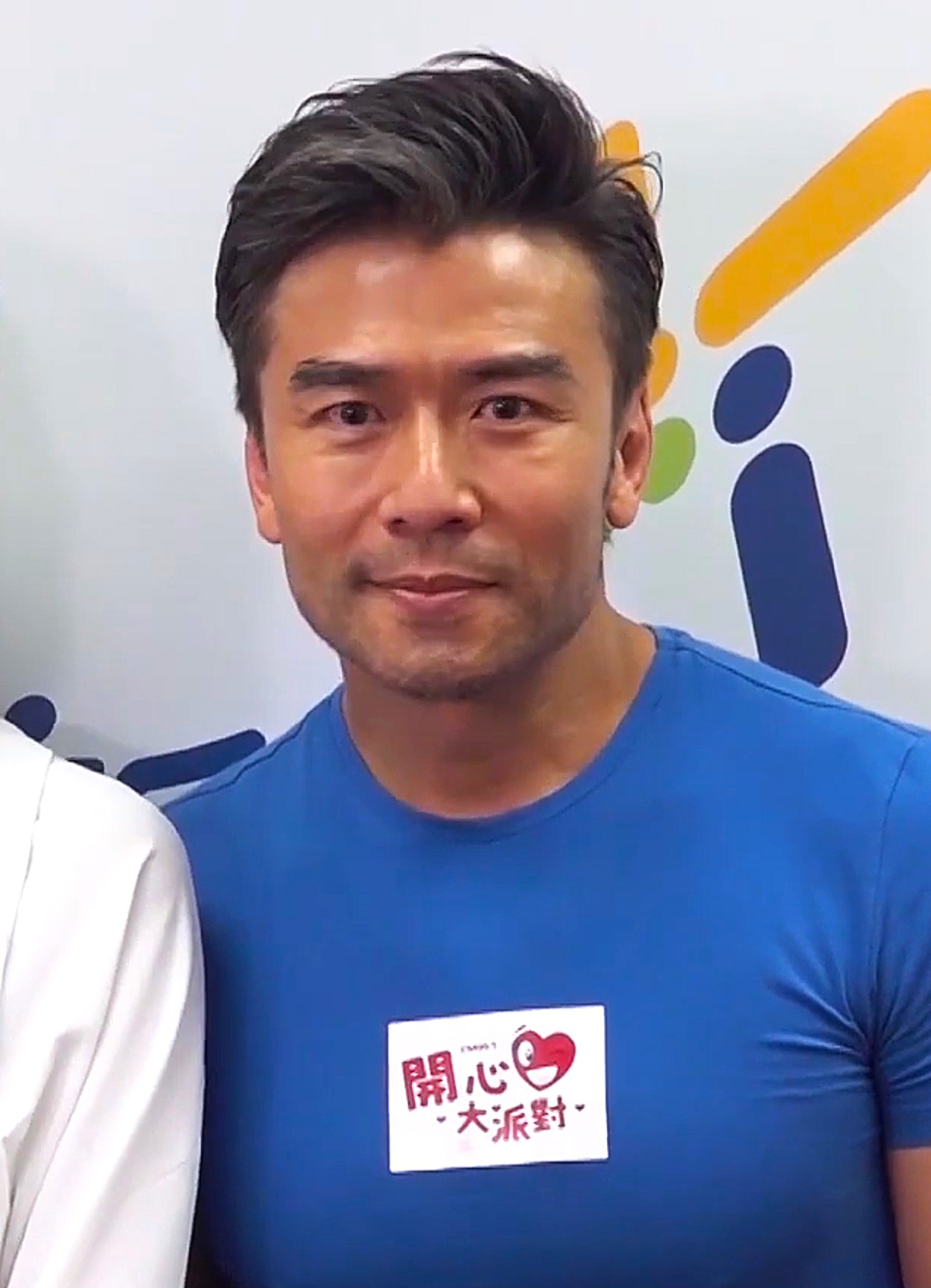 中文（香港）: 《不義之戰》電影宣傳